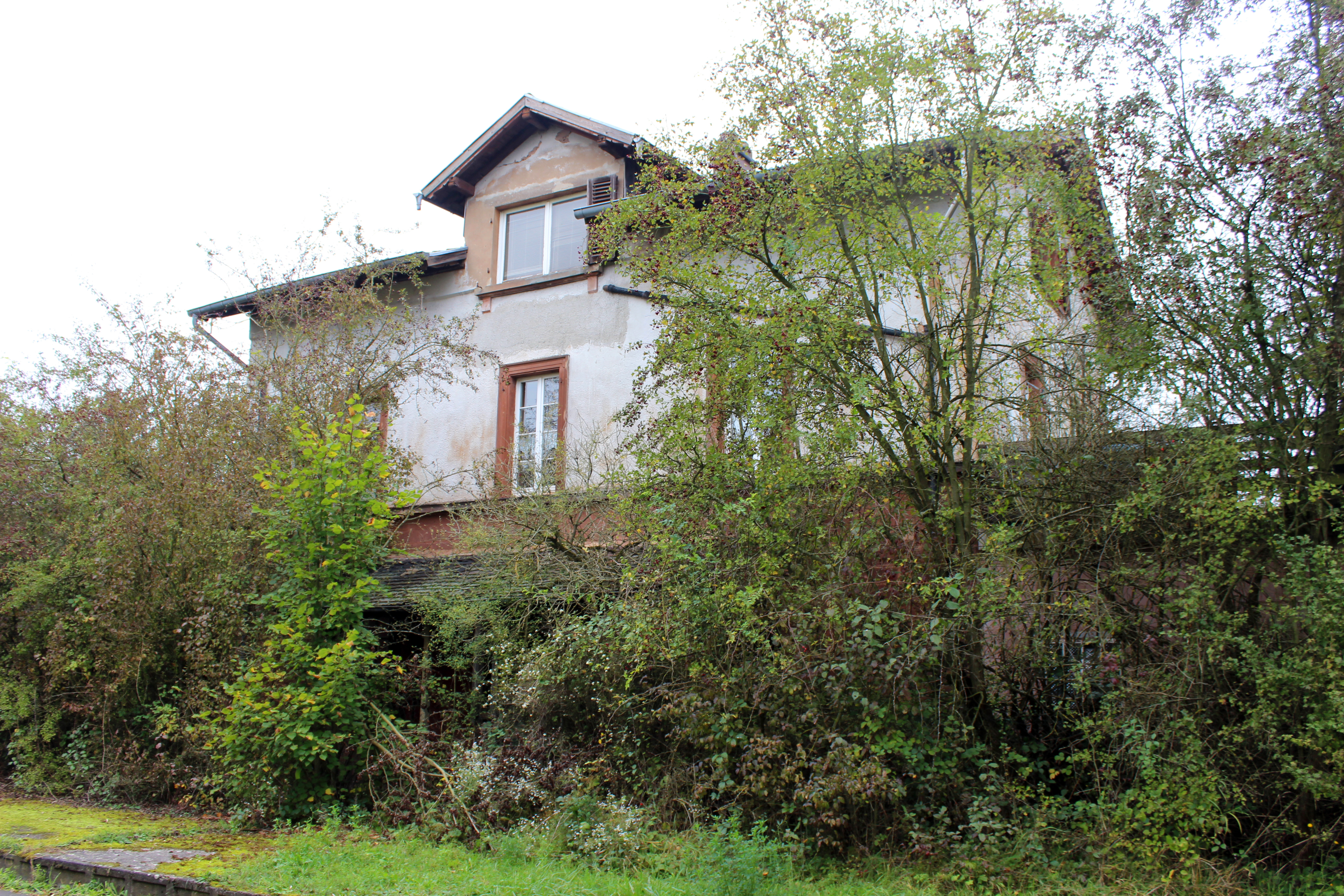 Reinheim, Gemeinde Gersheim, Saarpfalz-Kreis, Saarland - Ehemaliger Bahnhof